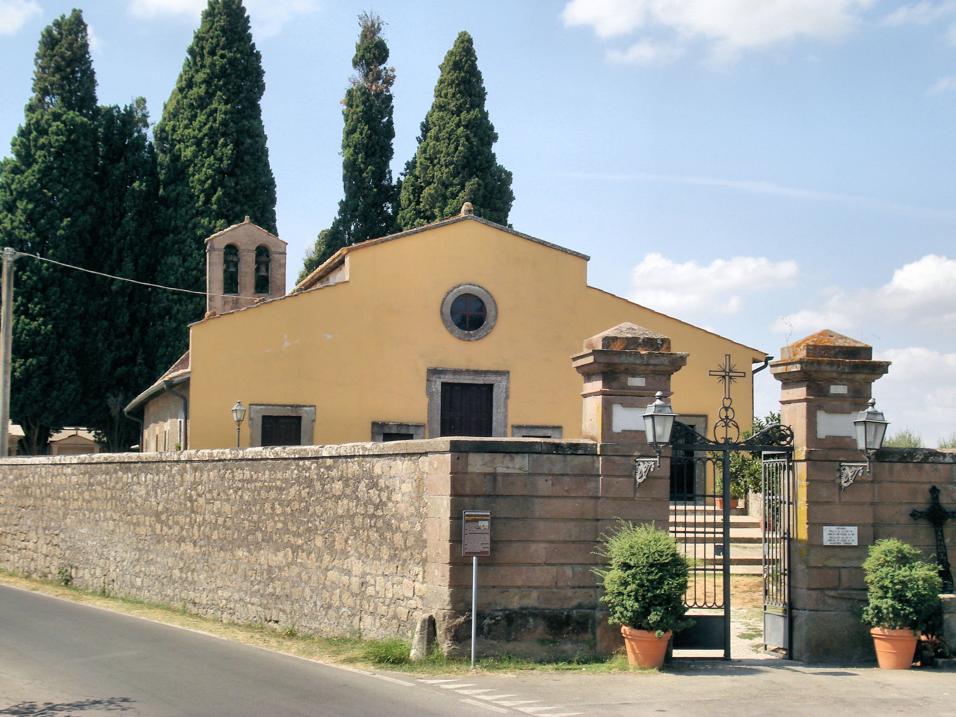 Cosmin latan